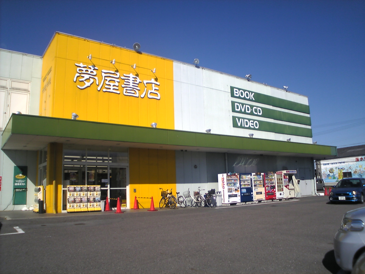 夢屋書店・小牧西店。なおこの店は2012年8月に閉店した。